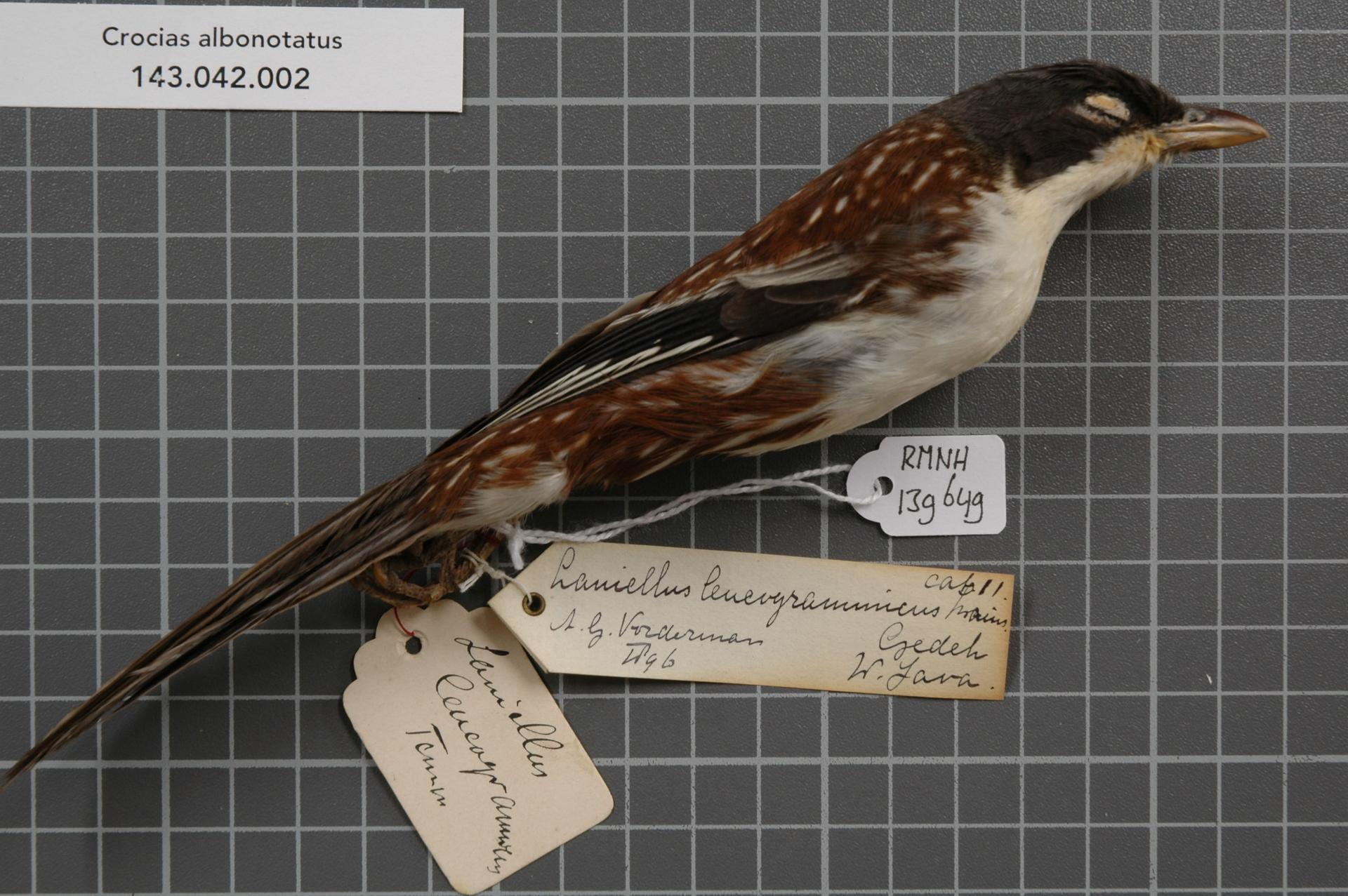 Crocias albonotatus (Lesson, 1832)